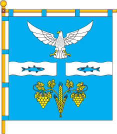 Прапор села Орлівка (Ренійський район)